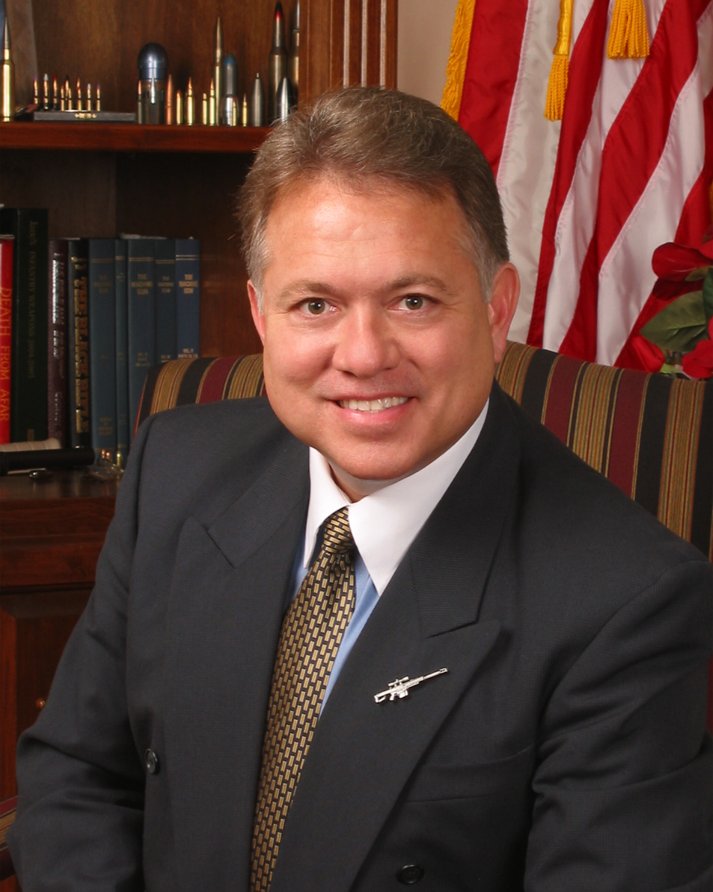 Ronnie G. Barrett